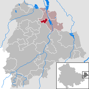 Gerstenberg in Thuringia - District Altenburger Land